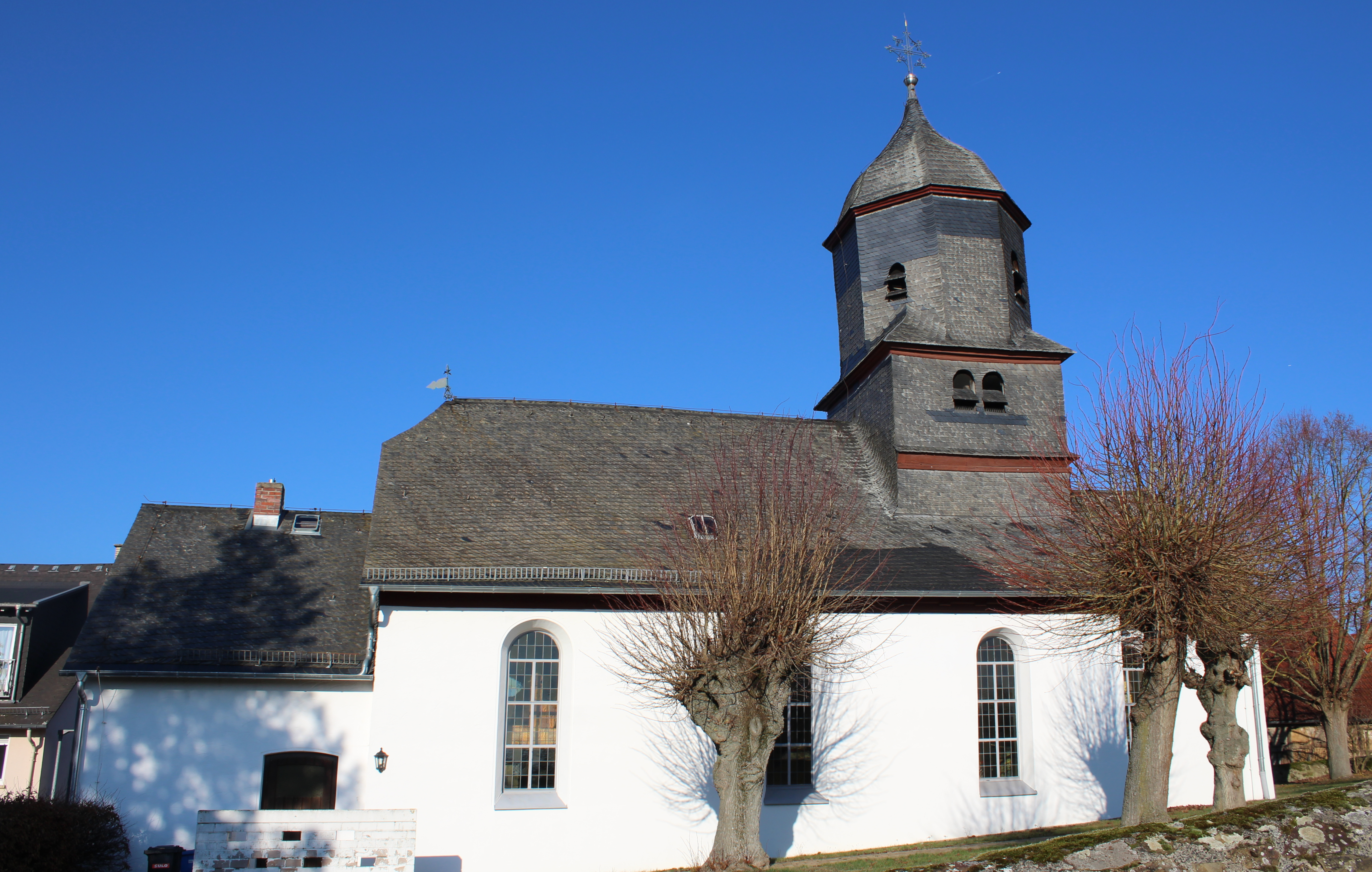 Evangelische Kirche Großrechtenbach, Gemeinde Hüttenberg, Lahn-Dill-Kreis, Hessen, Deutschland